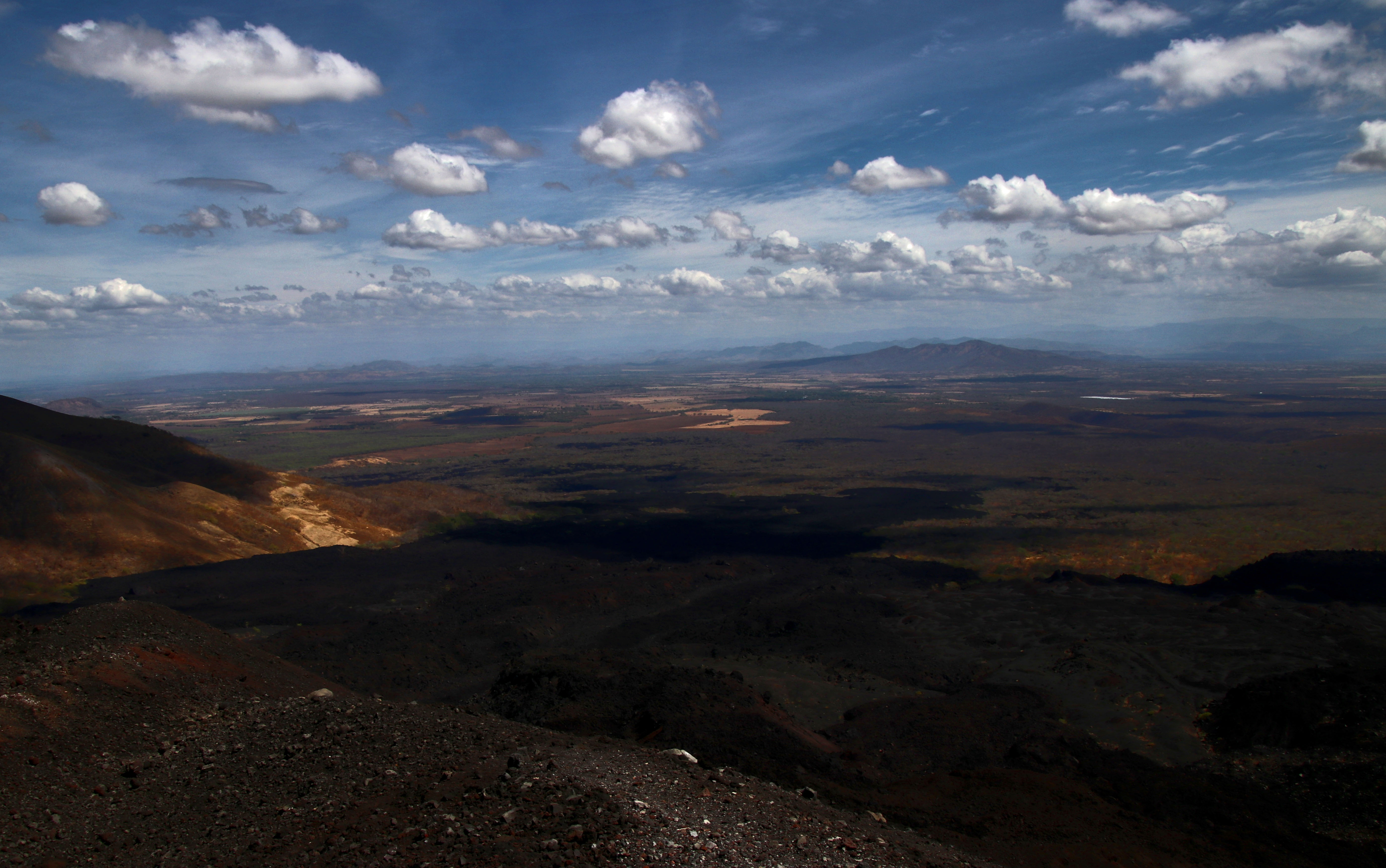 León. Vue depuis le sommet du Cerro Negro.